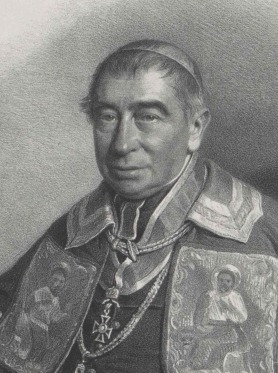 Greckokatolicki biskup przemyski i lwowski